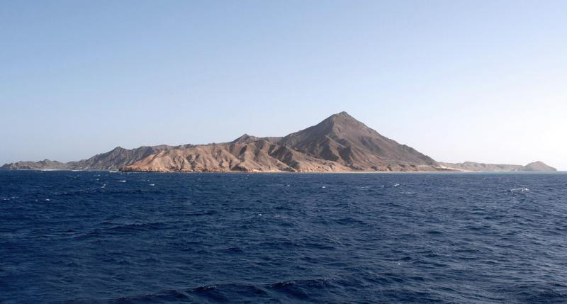 Ostrov Zabargad v Rudám moři